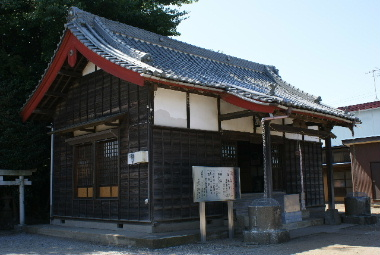 右京塚神社拝殿